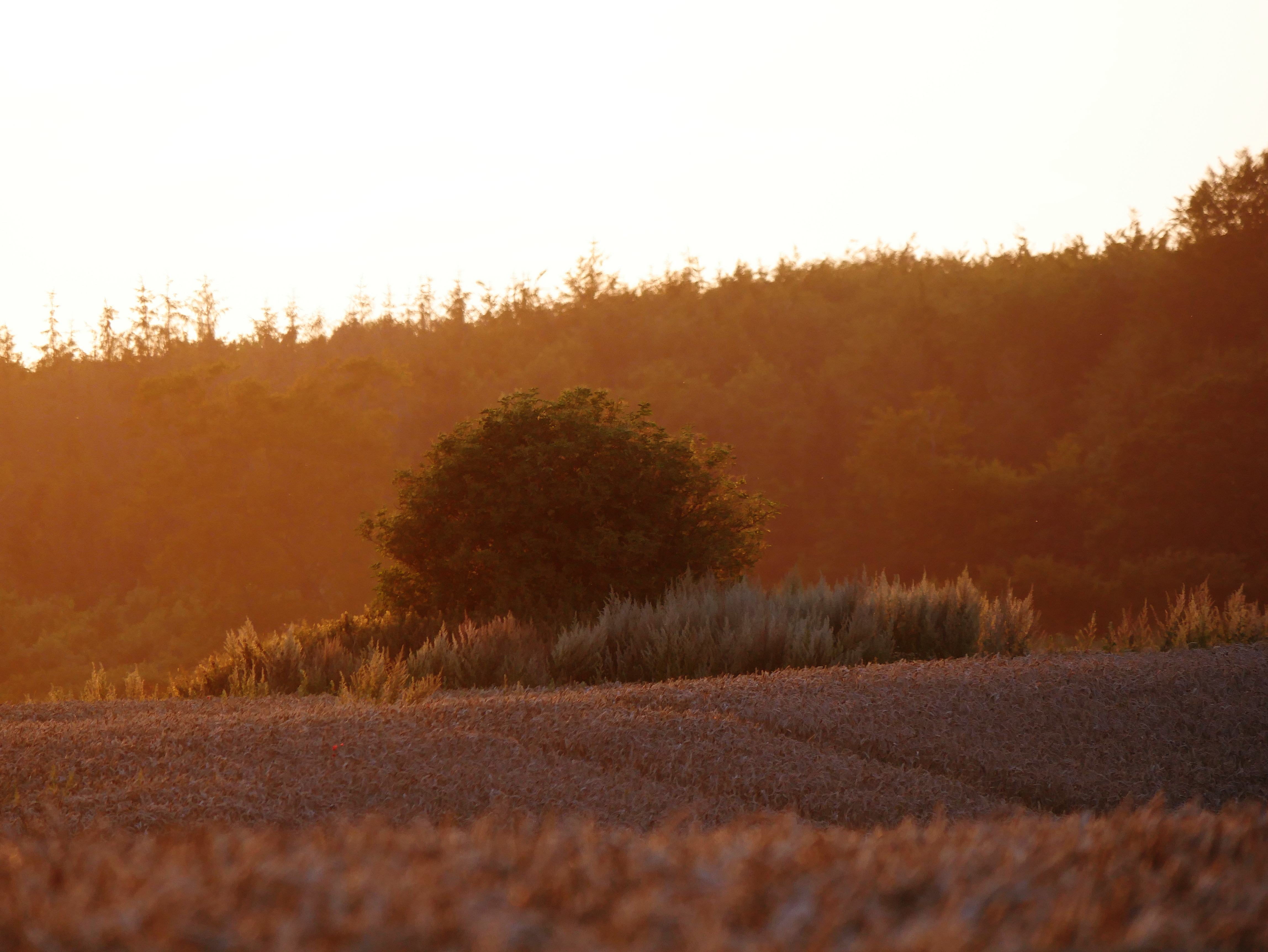 Dreslette Langdysse. Der ehemalige Langdysse muss drei Dolmen enthalten haben, von denen nur der mittlere erhalten ist. Die etwa West-Ost orientierte ausgegrabene Kammer des erweiterten Dolmens hat sechs Trag- und zwei Decksteine. Der zugehörige Gang und der Schwellenstein fehlen. Der Grabhügel ist kaum erhalten, seine Randsteine fehlen. Die Langdysse liegt mitten in einem Kornfeld, das im Juli 2020 leider noch nicht abgeerntet war.